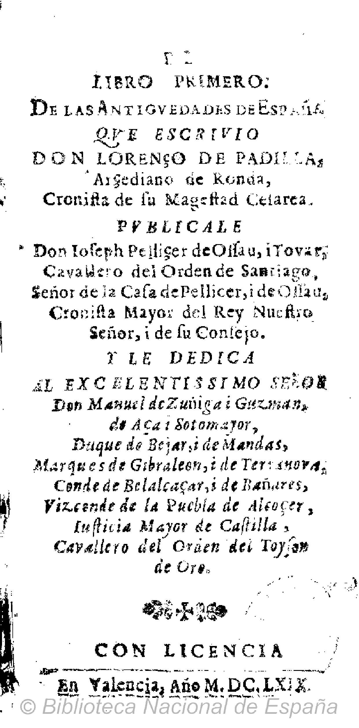 El libro primero de las antiguedades de España que escriuio Lorenço de Padilla ... ; publicale don Joseph Pelliçer de Ossau, i Tovar ... Autor: Padilla, Lorenzo de (1485-1540) Fecha: 1669 Datos de edición: En Valencia (Pellicer de Ossau y Tovar, José (1602-1679).)